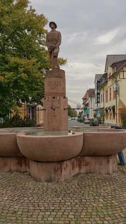 Brunnen in Jugenheim, 1909 geplant und ausgeführt von Daniel Greiner